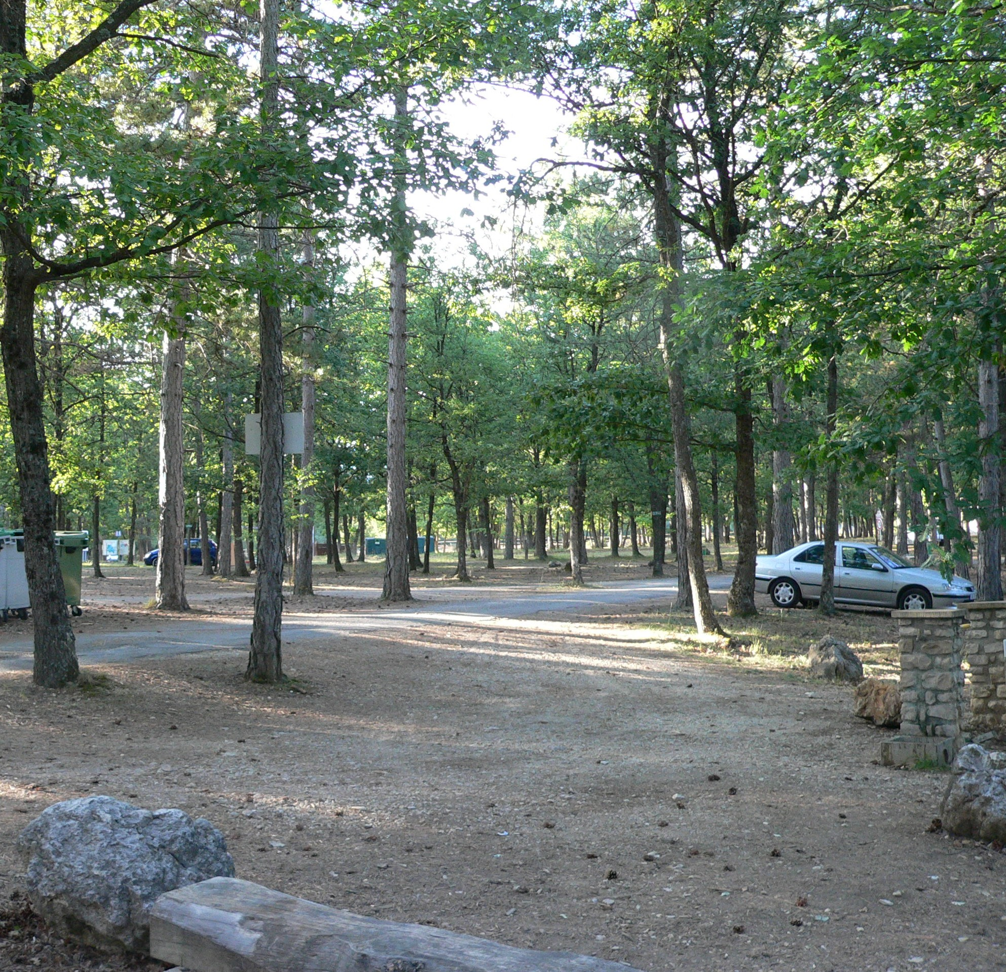 Campsite in Sault, France/ Place à Camping à Sault, France/ Campingplatz in Sault, Frankreich